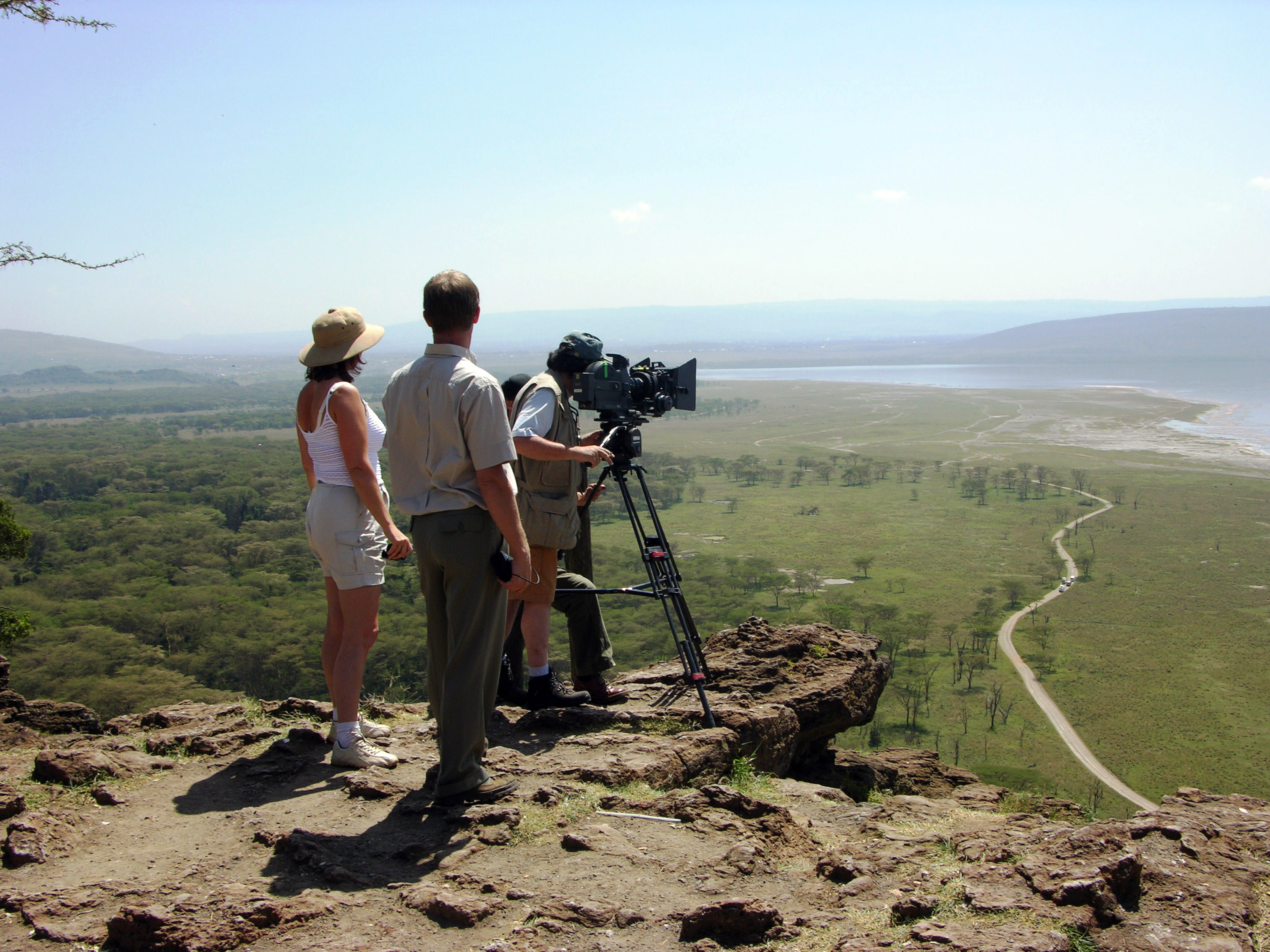 Fra optagelserne i Kenya. Instruktørerne Anna von Lowzow og Marcus Mandal med filmfotograf Jan Weincke